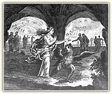 Askalaphos